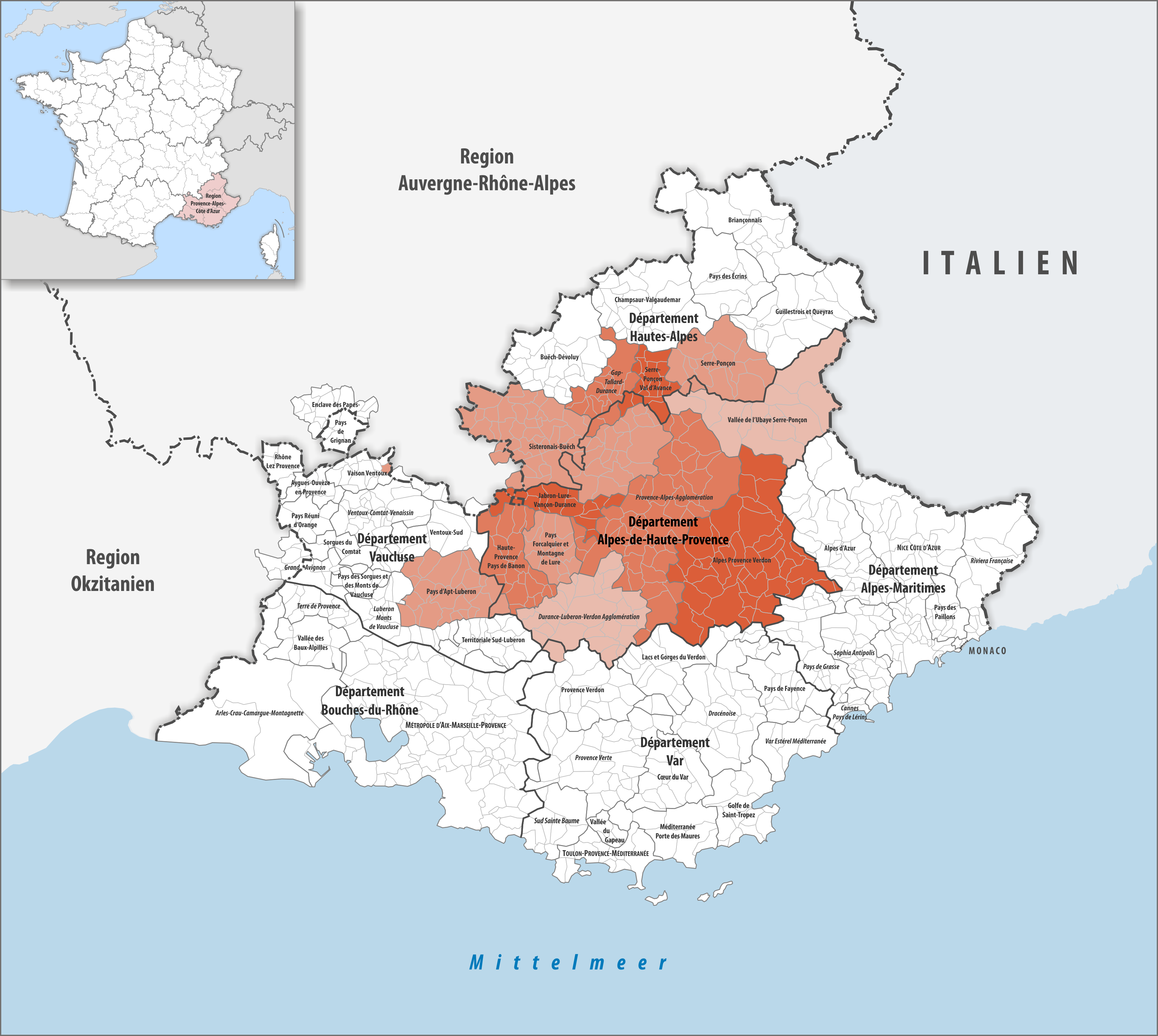 Gemeindeverbände im Département Alpes-de-Haute-Provence